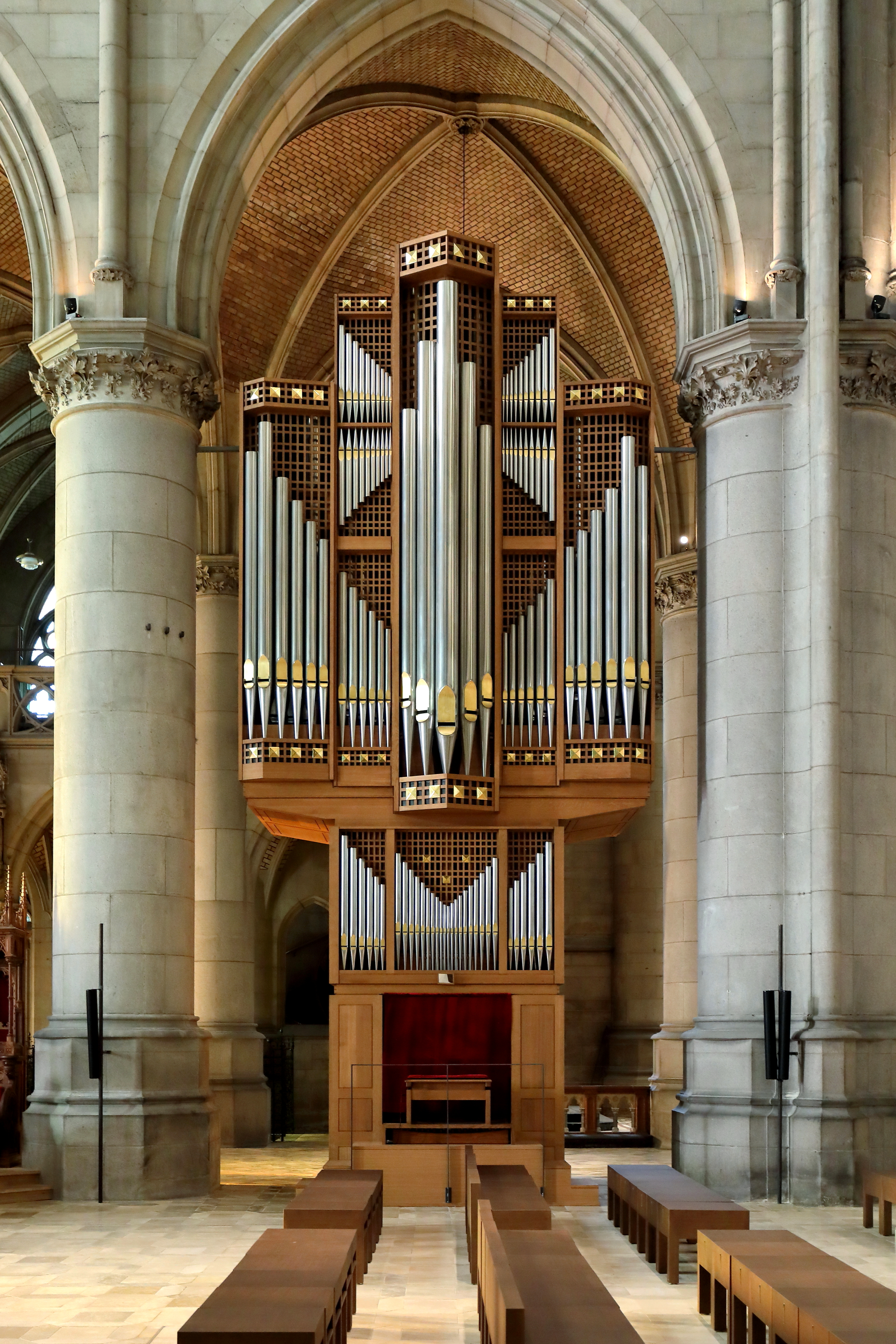 Die Chororgel im Altarraum des Mariendomes in der oberösterreichischen Hauptstadt Linz.Die Orgel wurde 1989 von der Vorarlberger Orgelbaufirma Pflüger gebaut und verfügt über 27 Register sowie mechanische Spiel- und Registertrakturen. Sie ersetzte die Lachmayr-Orgel aus dem Jahr 1887 im ehemaligen „Sängerchor“, die 1931 von den Gebrüder Mauracher restauriert und von II+P/34 auf III+P/53 erweitert wurde. Bei der Innenraum-Neugestaltung im Jahr 2017 wurde die Pflüger-Chororgel gereinigt, versetzt und neu intoniert.